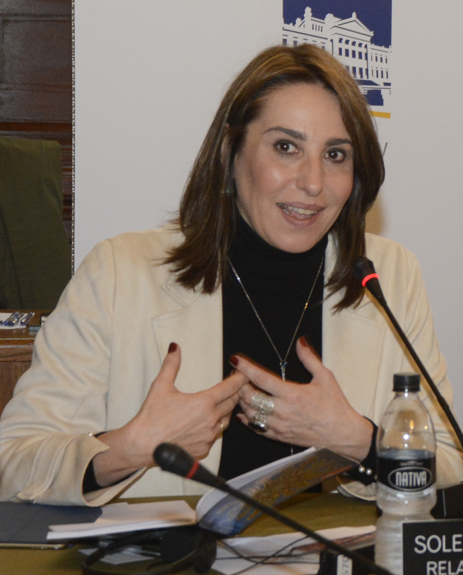 Soledad García Muñoz, Relatora Especial sobre Derechos Económicos, Sociales, Culturales y Ambientales (DESCA), junto a Margarette May Macaulay, presidenta de la CIDH. Sesión sobre la situación de derechos humanos de los pueblos indígenas en Brasil. 165 Periodo de Sesiones en Montevideo. Lunes 23 de octubre de 2017. Foto: Eduardo López/CIDH .